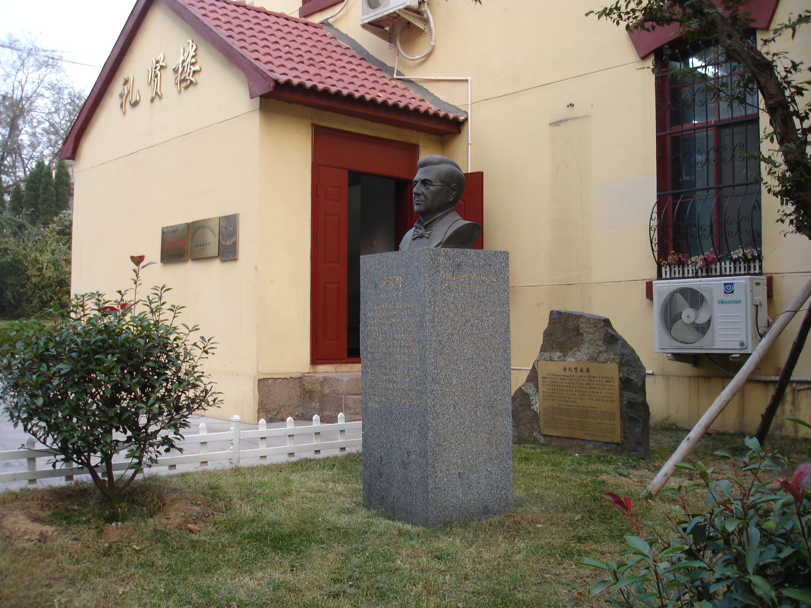 卫礼贤塑像